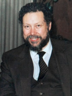 Hugo Zepeda Coll